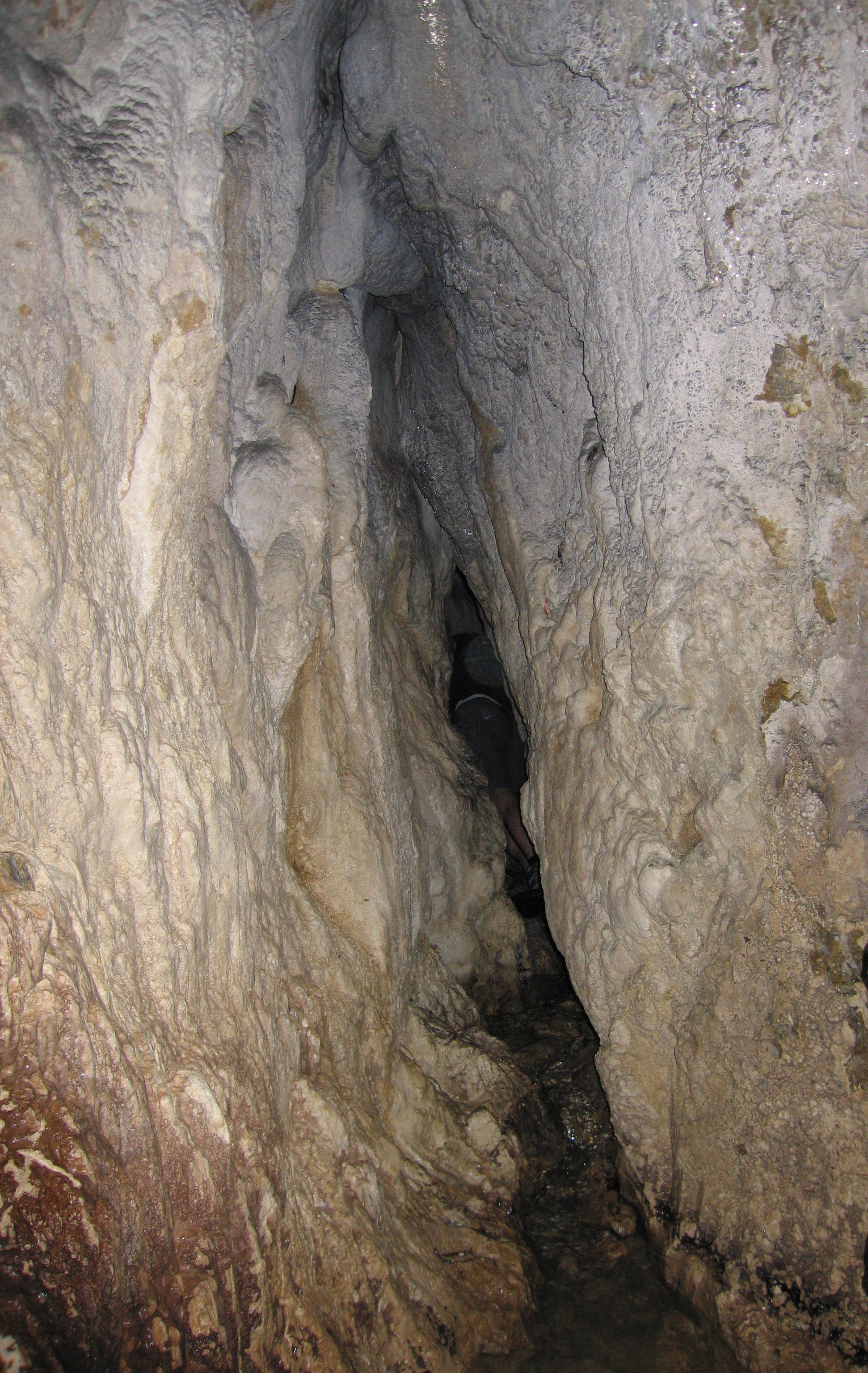 Mondmilchloch, Höhle am Pilatus, Schweiz